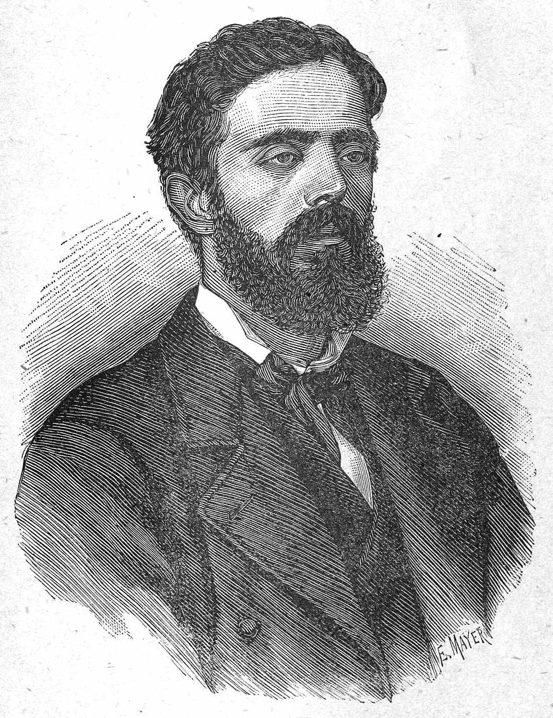 Retrato de Jesús Muruais